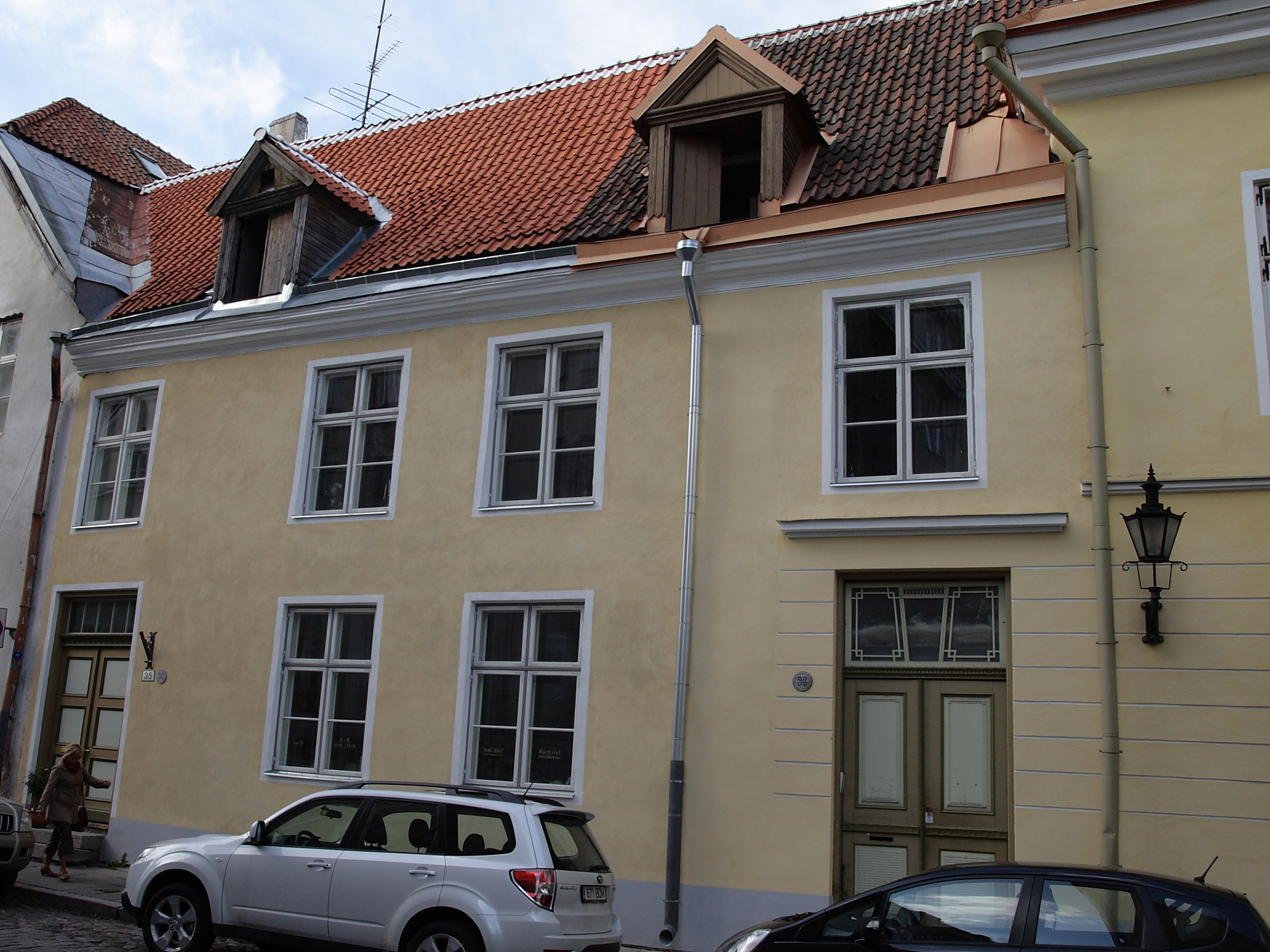 Tallinn, elamu Lai 35, 15.-19.saj